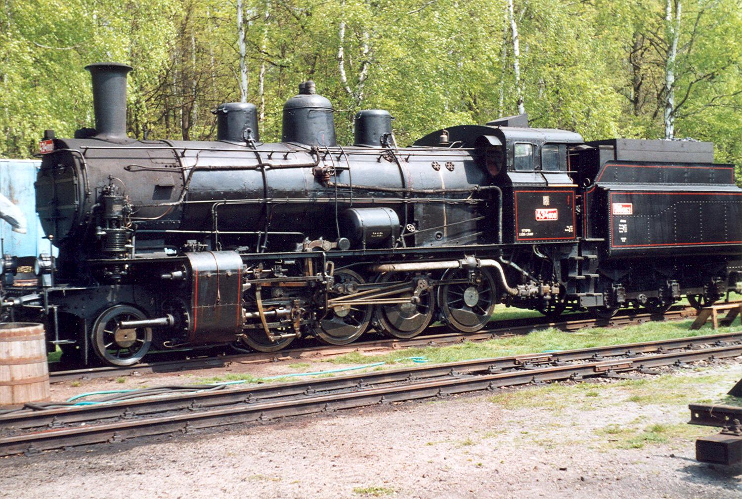 434.1100 im Eisenbahnmuseum Lužna u Rakovníka